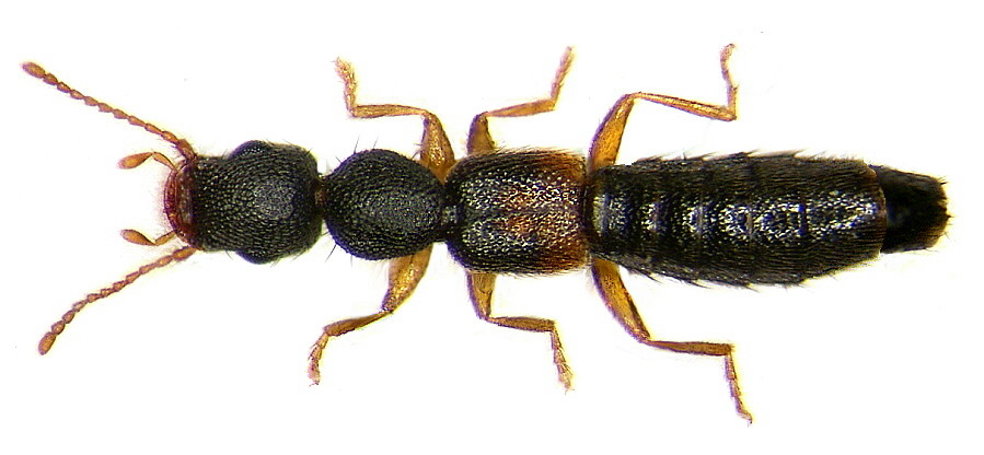 Familie: Staphylinidae Grösse: 3-3,5 mm Verbreitung: Europa Fundort: Germania, Bayern, Oberfranken, Selbitz leg.det. U.Schmidt, 2000 Foto: U.Schmidt, 2005